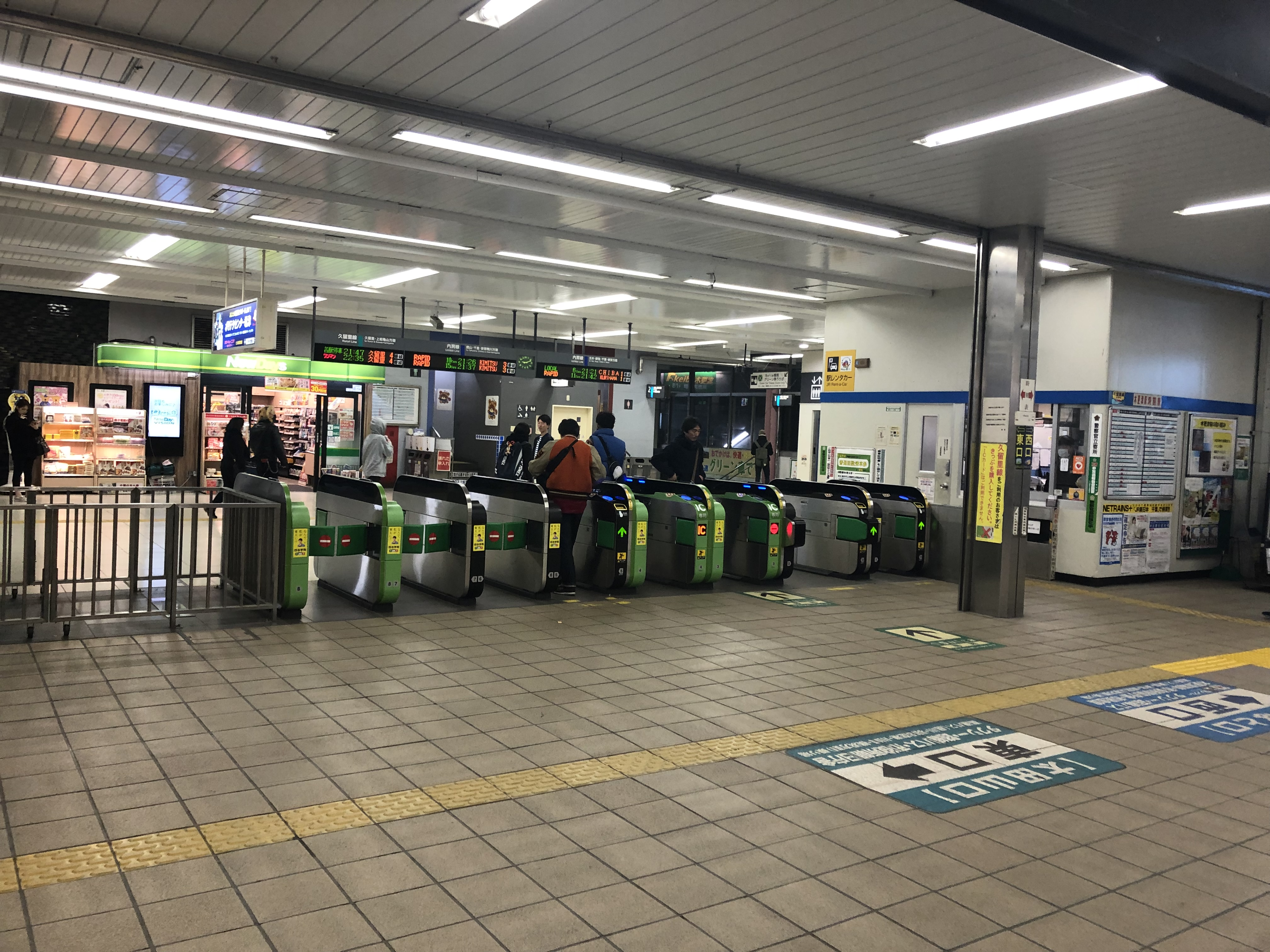 改札外から撮影